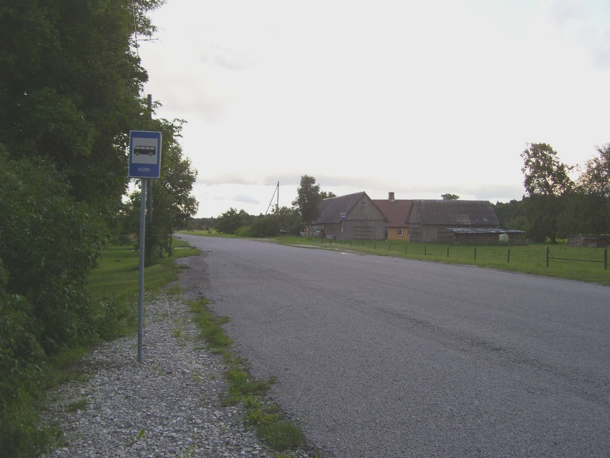 Tempa-Suuresadama tee, Kuri bussipeatus, vaade Suuresadama poolt Tempa poole